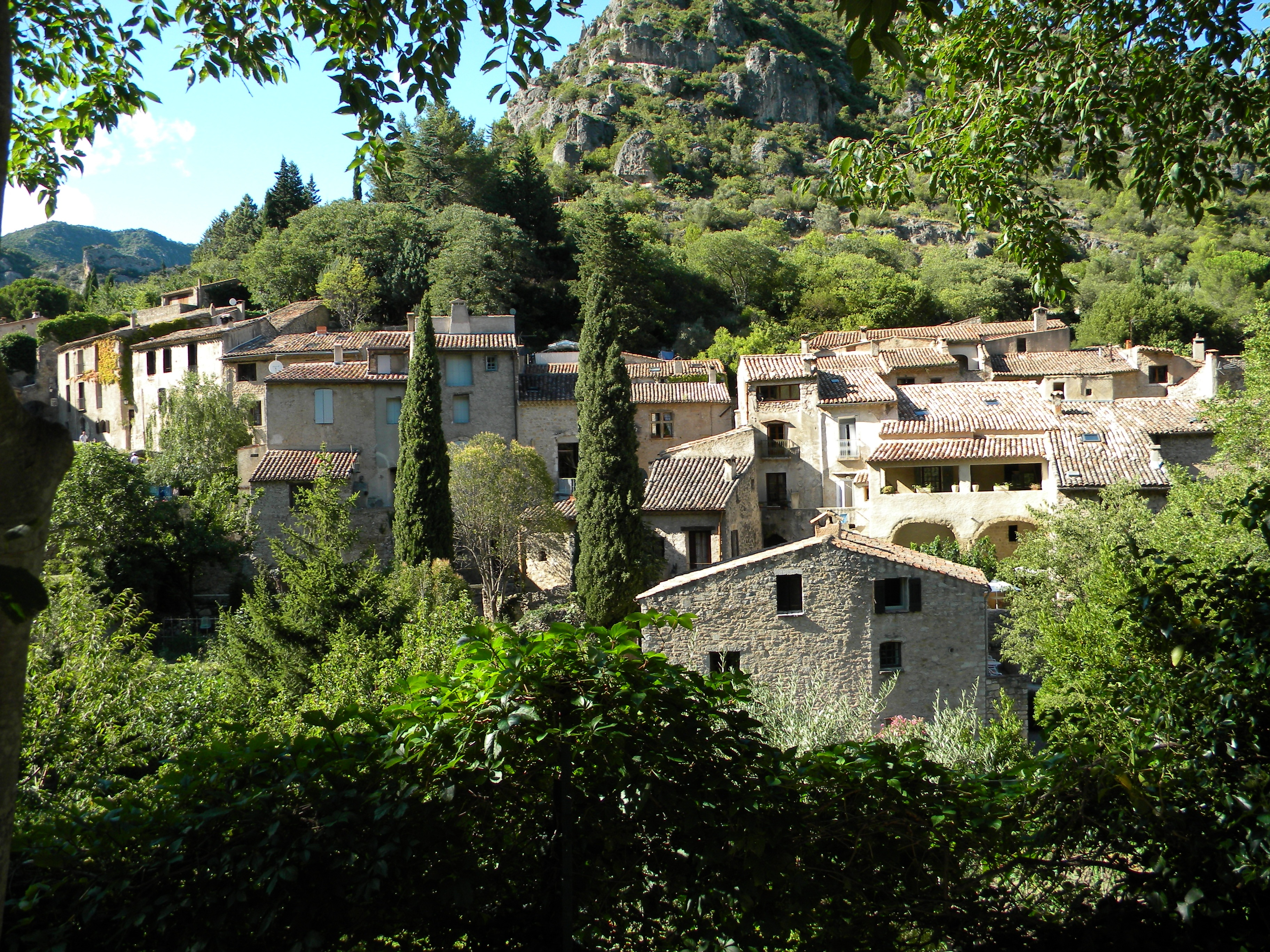 La foto que le mostramos esta tomada al pueblo medieval de Saint-Guilhem le Désert, Francia